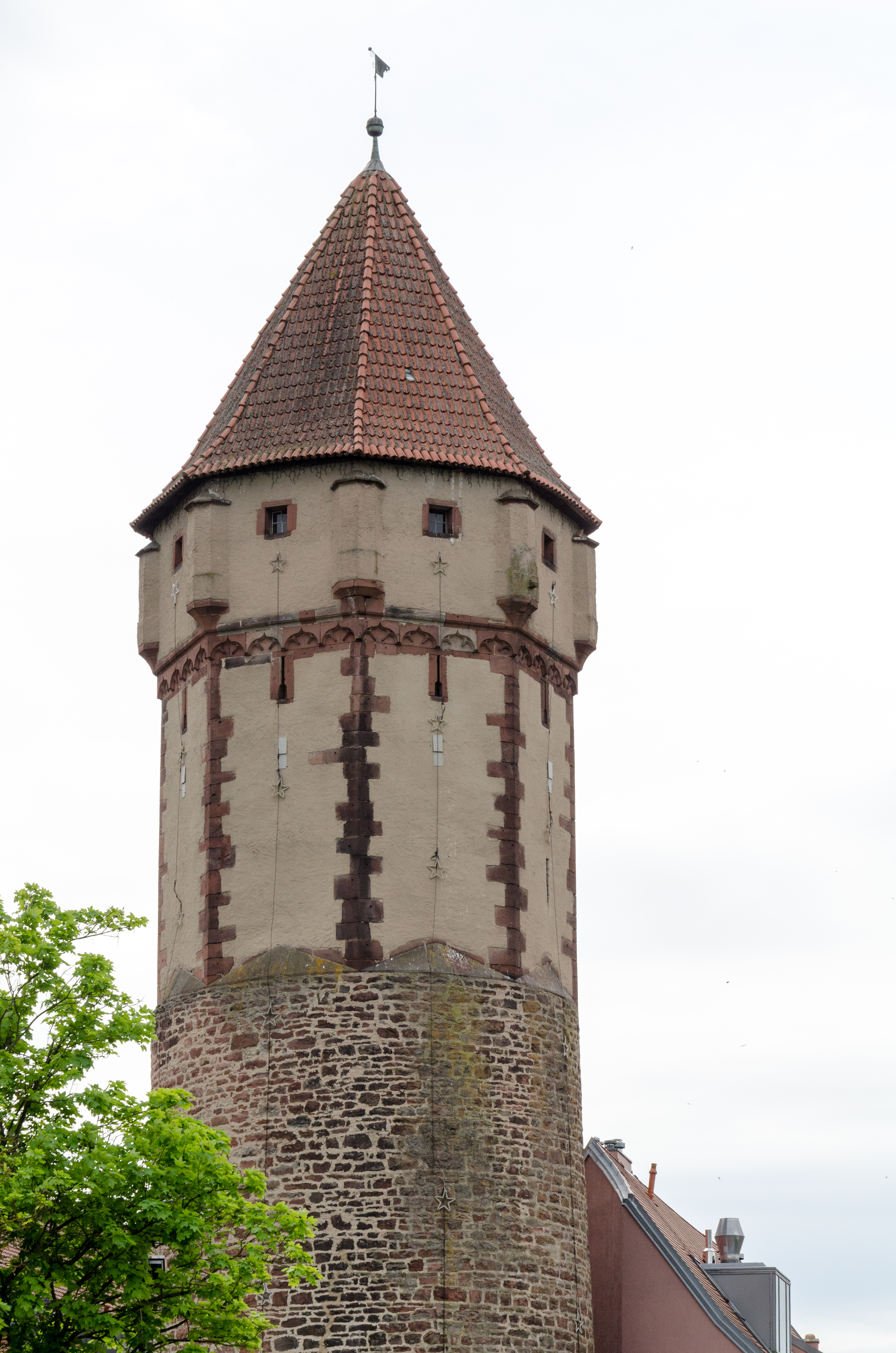 Wertheim, Stadtbefestigung, Spitzer Turm